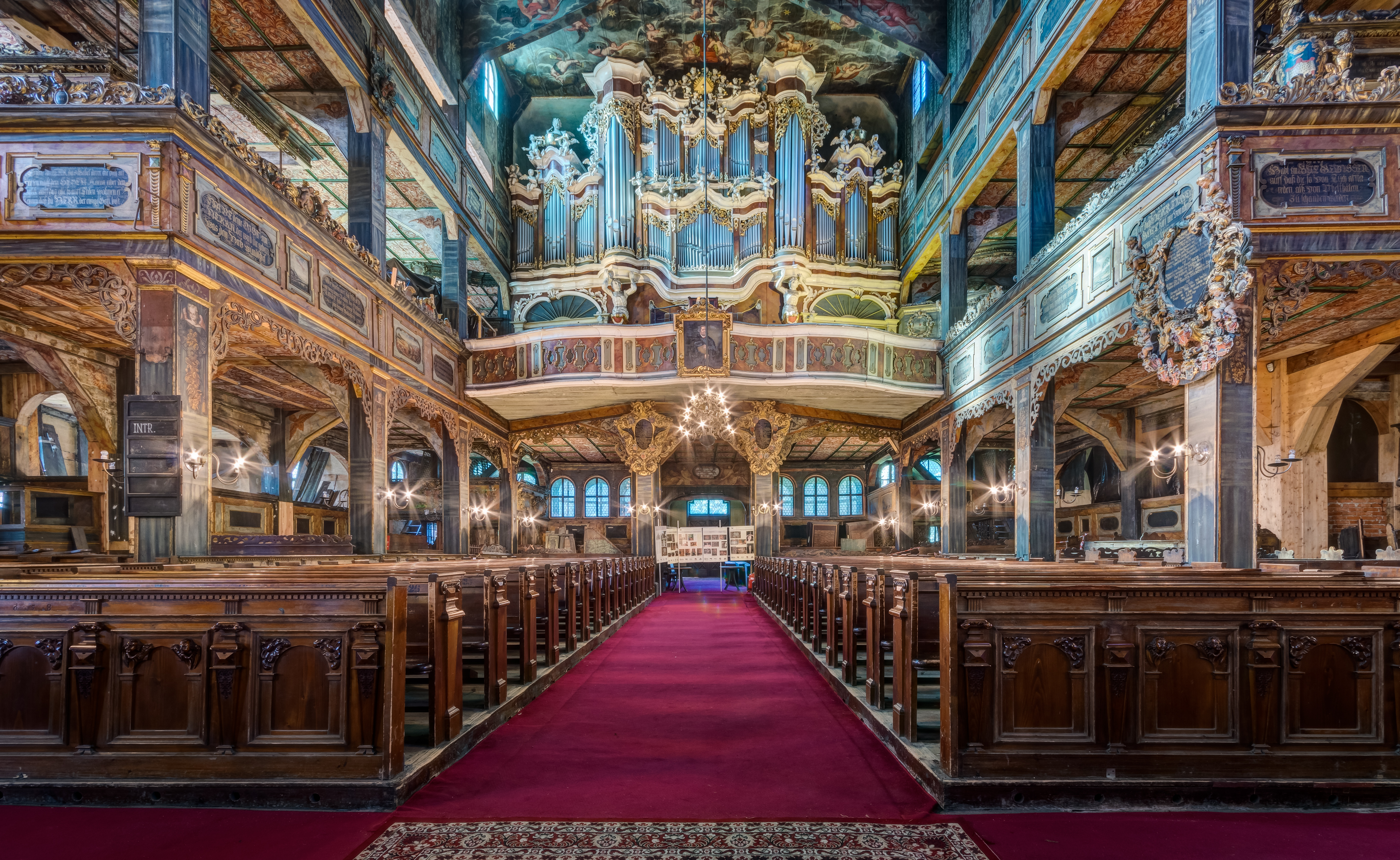 Świdnica, kościół ewangelicki (Pokoju), poł. XVII, XVIII - wnętrze kościoła w dziennym świetle